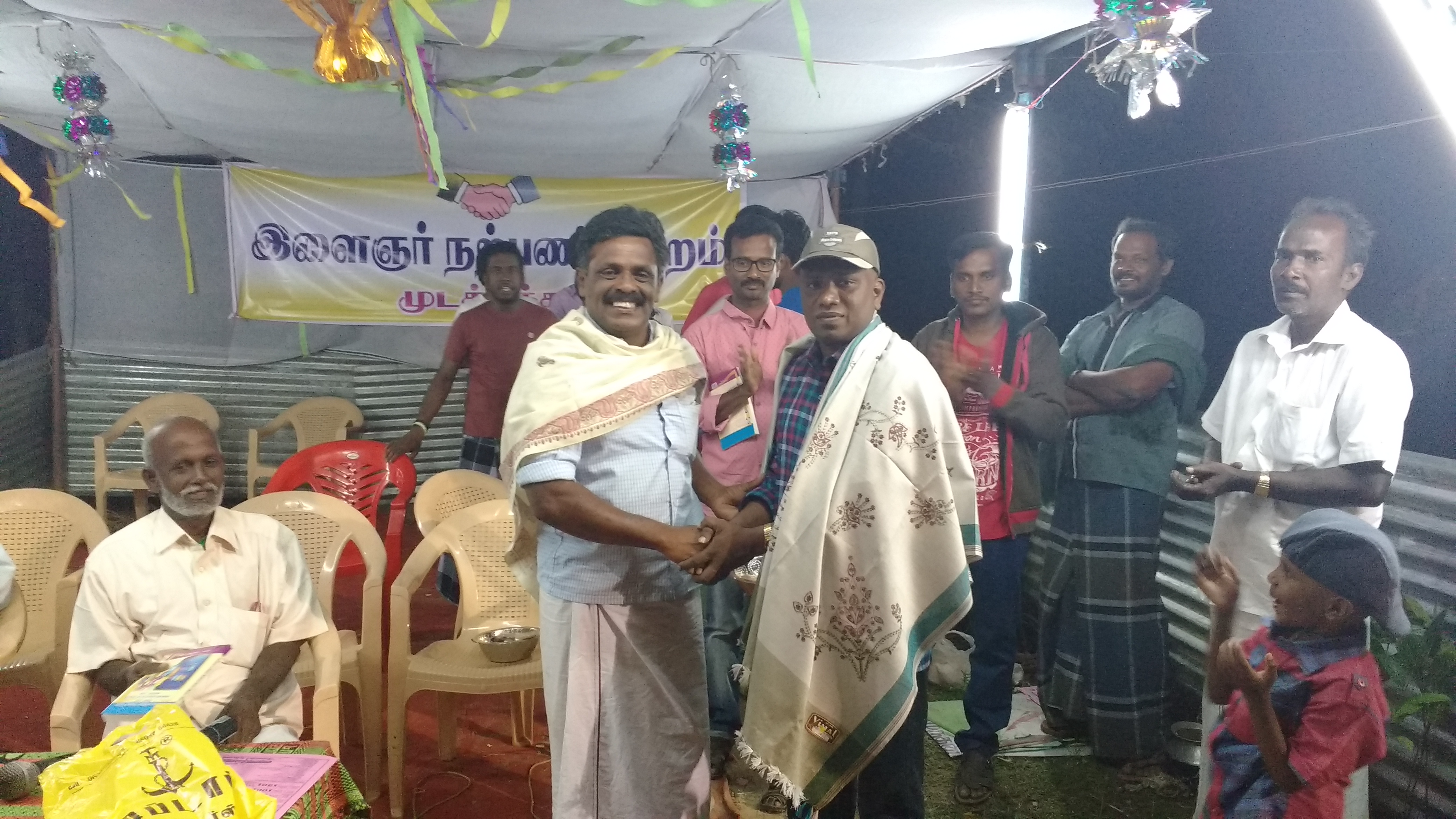 முடச்சிக்காடு இளைஞர் நற்பணி மன்றம்